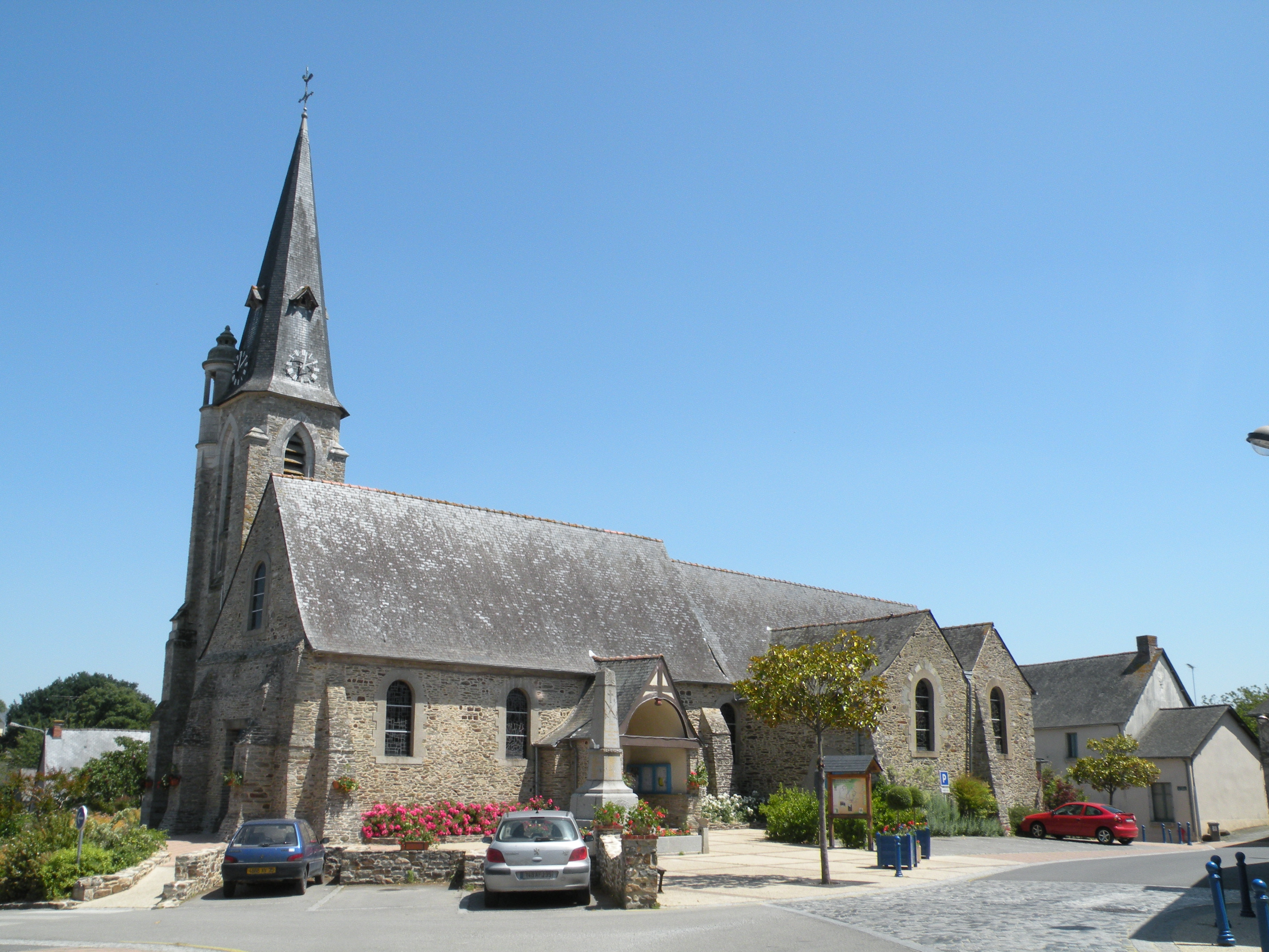 Église de Saint-Didier (Ille-et-Vilaine).